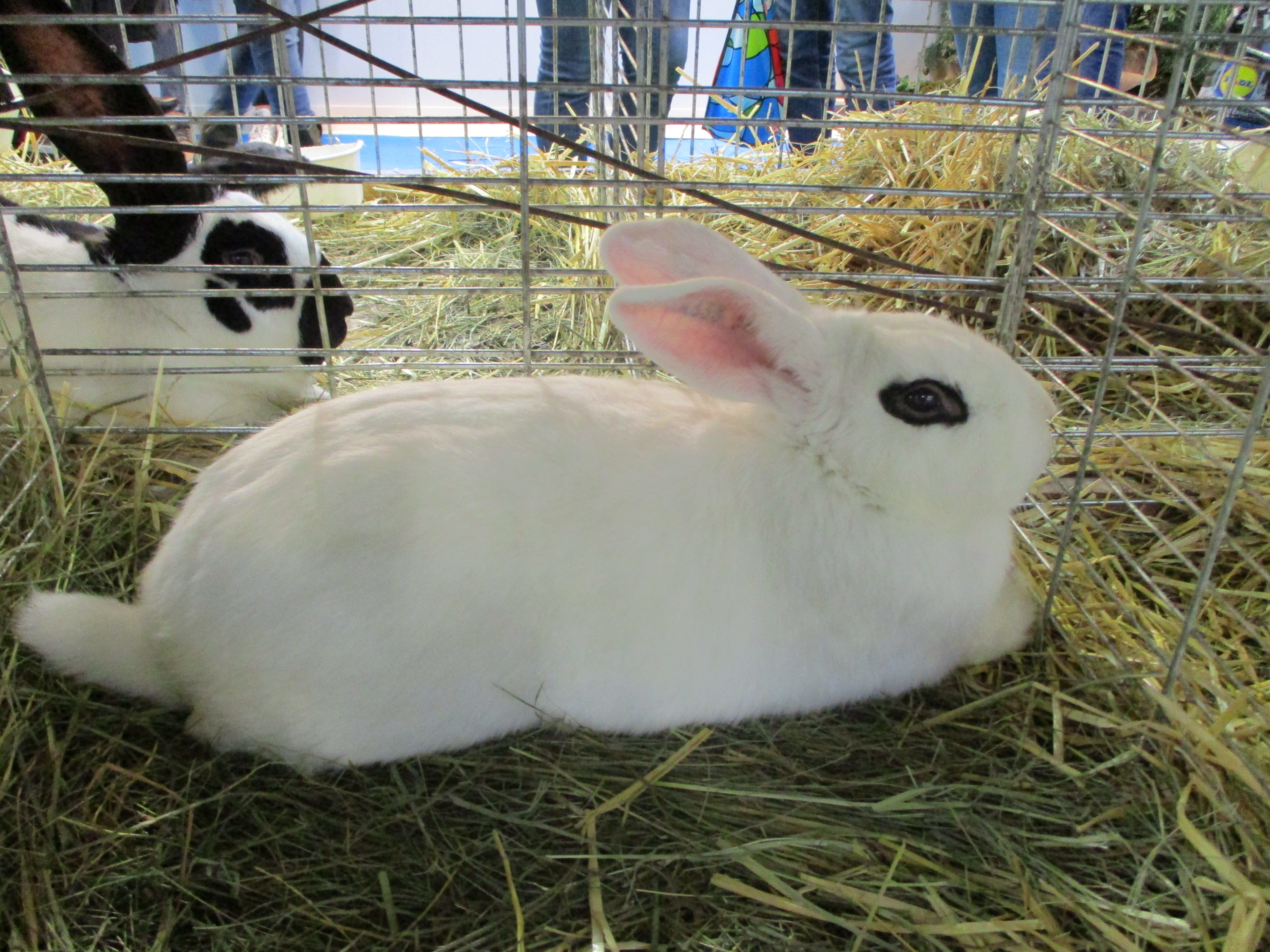 Lapin blanc de hoto au SIA 2019.